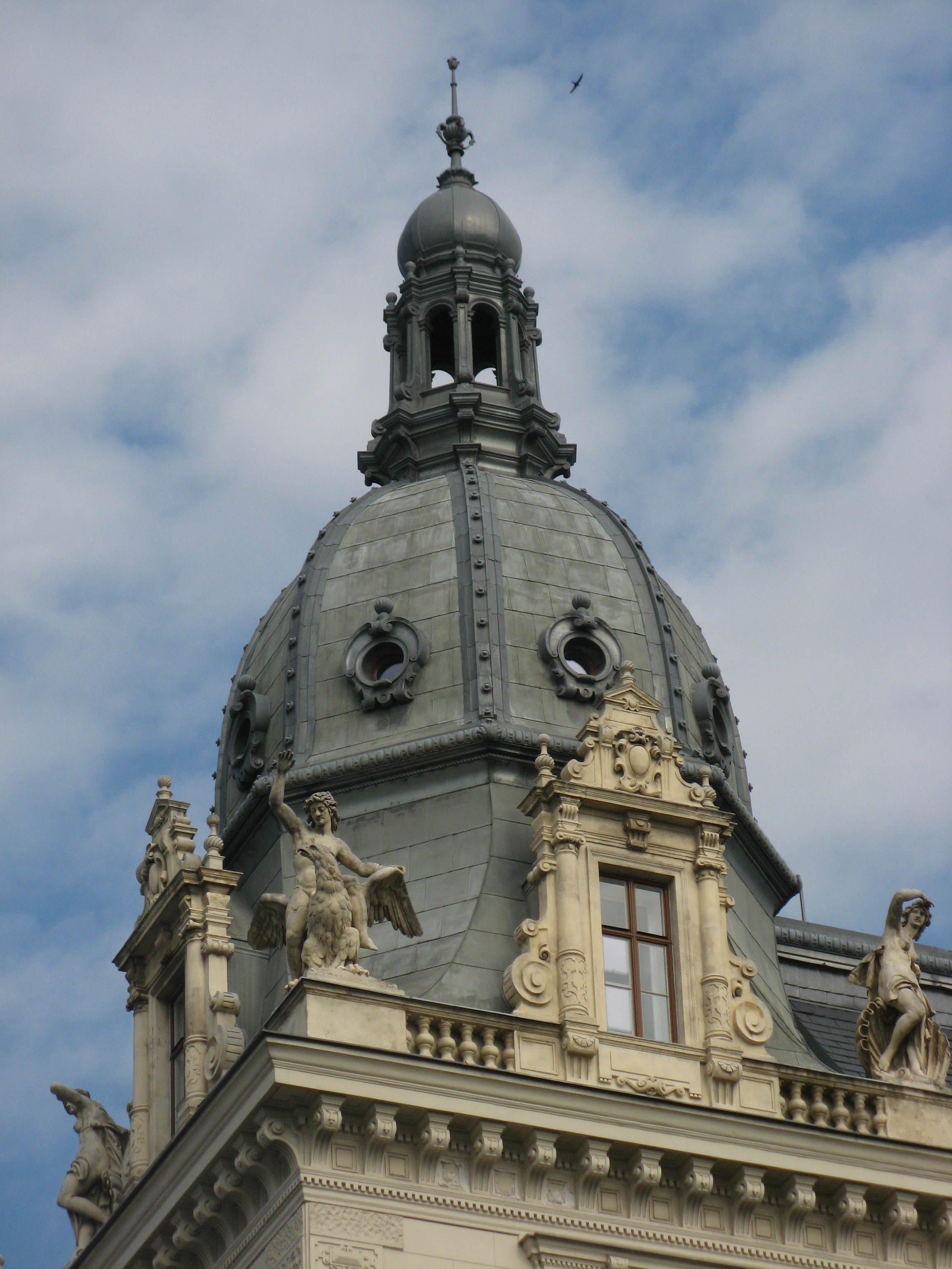 Detail vom Arkadenhaus (1877-78), Rathausplatz 7-9, Wien-Innere Stadt